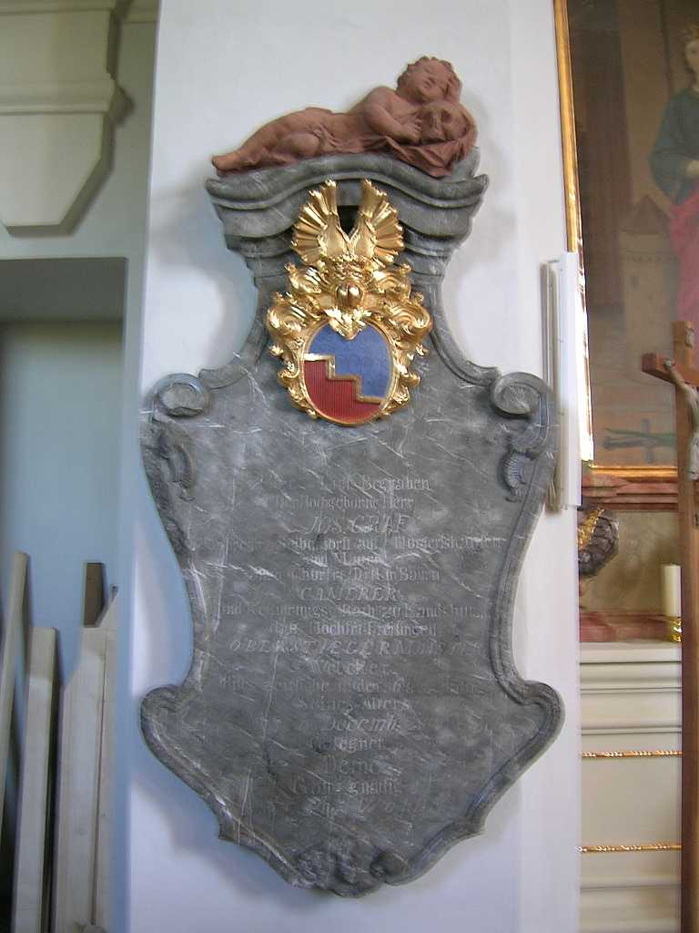 Pfarrkirche Hörgertshausen: GrabsteinThis is a photograph of an architectural monument.